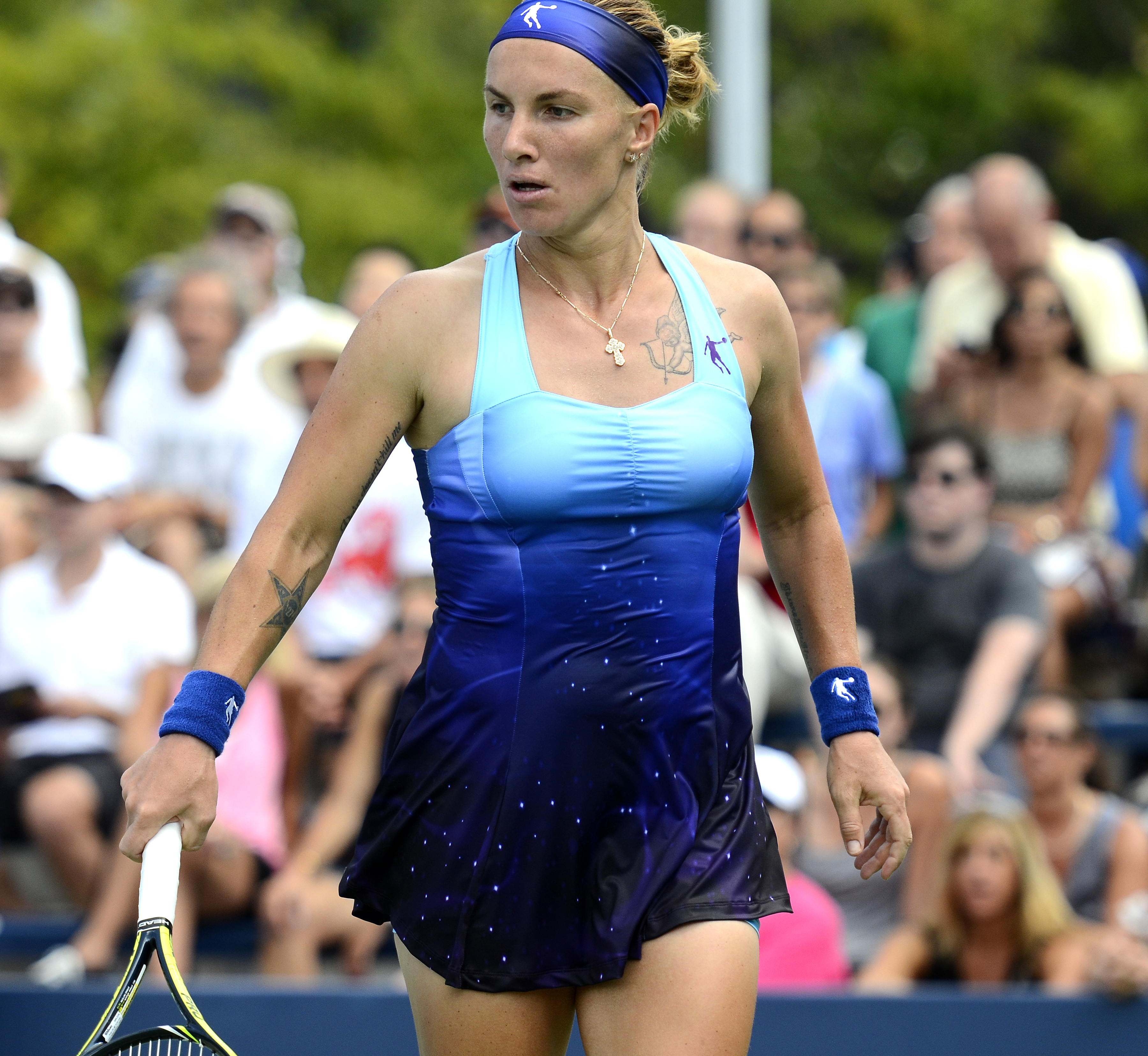 August 26, 2014 Queens, NY Marina Erakovic (NZL) def. Svetlana Kuznetsova (RUS)